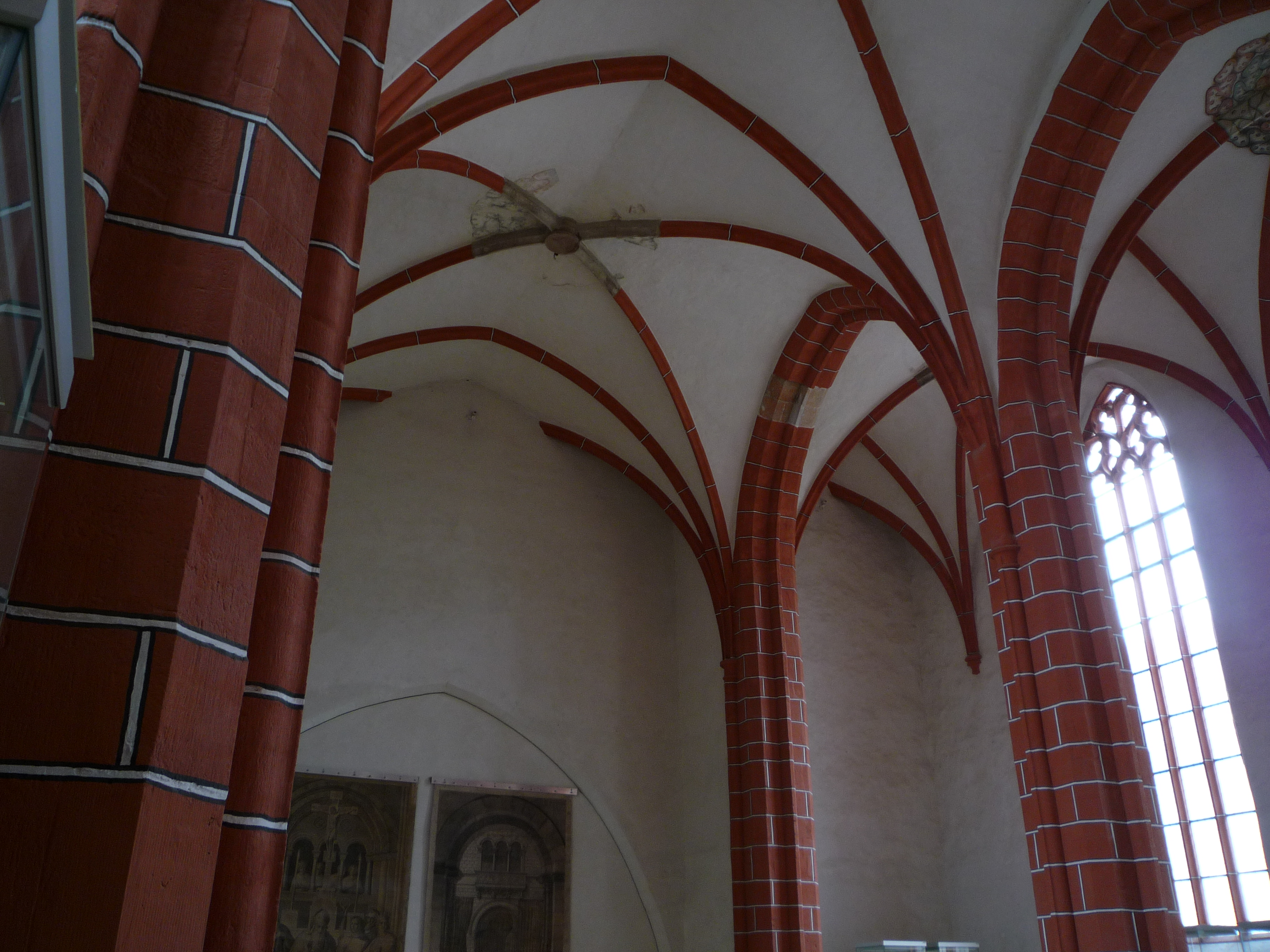 Stadtmuseum Meißen, Gewölbe des großen Ausstellungsraums. Fotografiert von der zweiten Ausstellungsebene, Blick zur nordöstlichen Gebäudeecke.